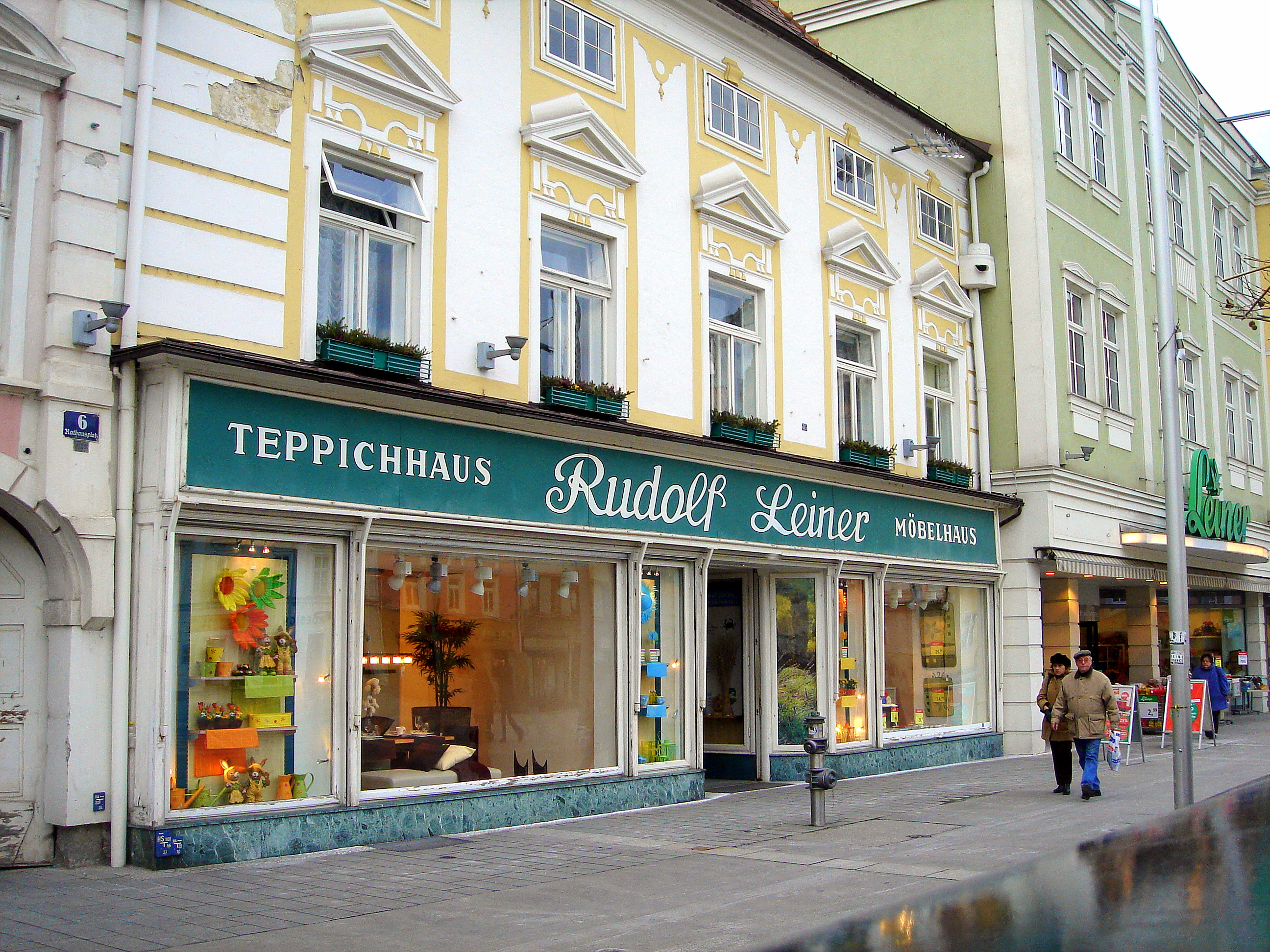 Das Stammhaus von Leiner am Rathausplatz in Sankt Pölten, links die relativ getreue Orginalbeschriftung.